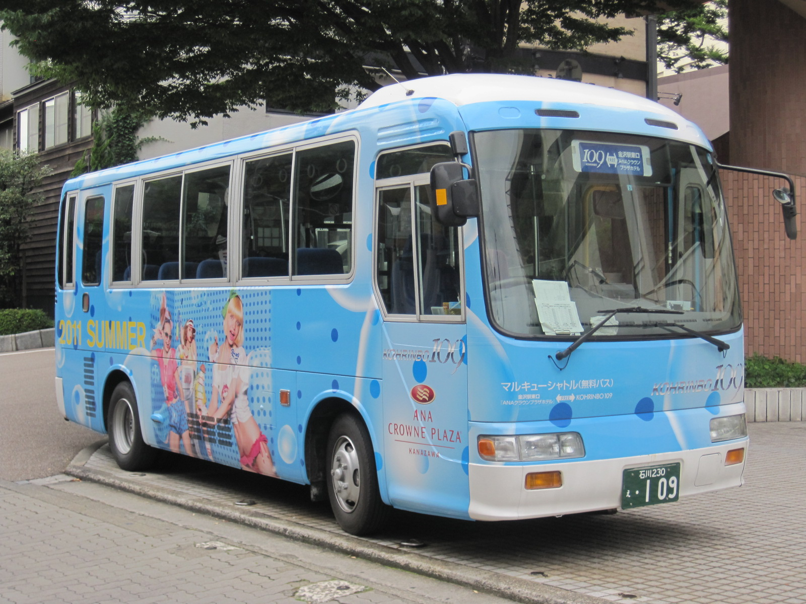 京福リムジンバス所有の日野・リエッセ。KOHRINBO109と金沢駅間を結ぶ「マルキューシャトル」で運用されている。